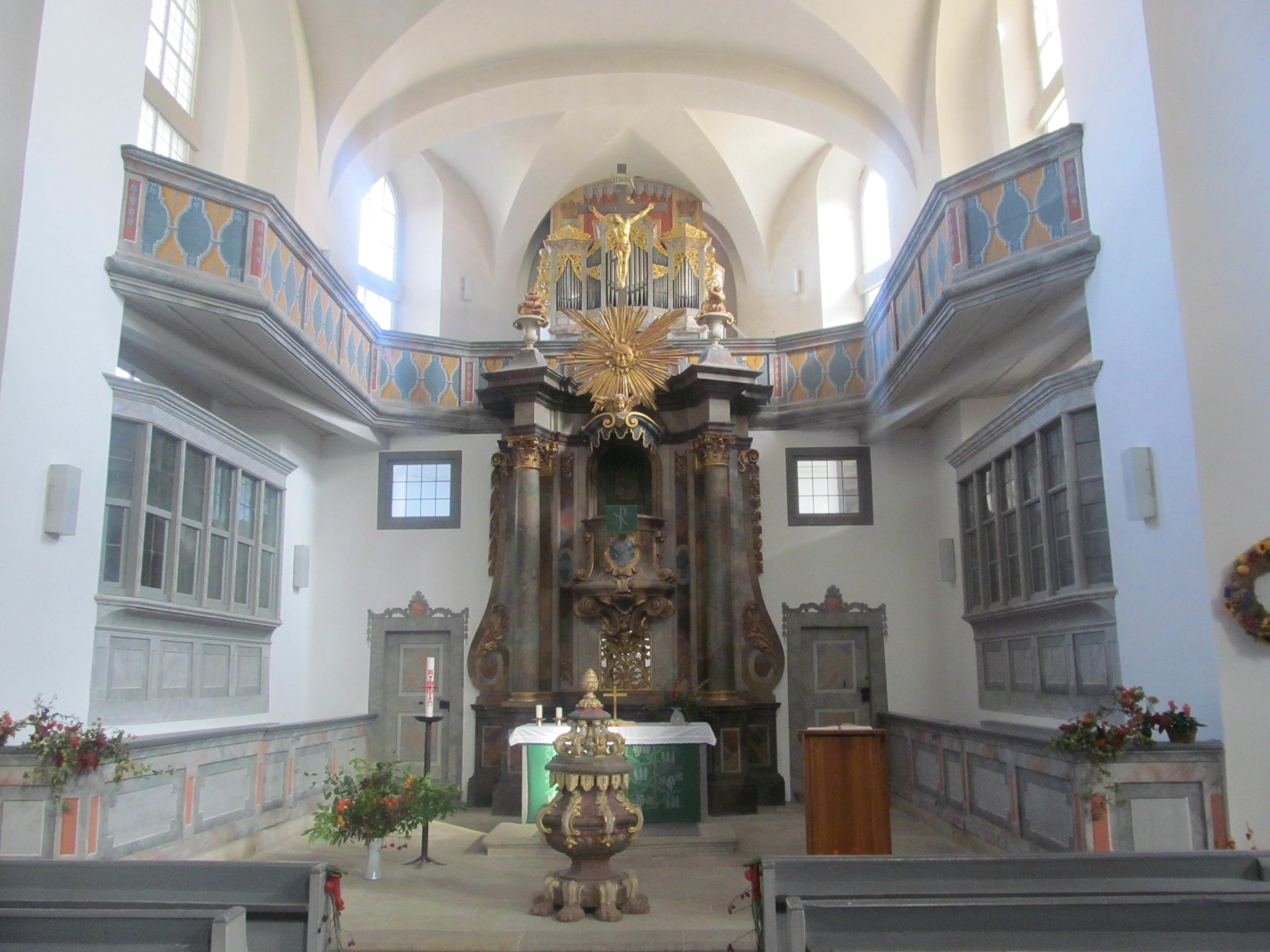 Hohnstein interiér kostela